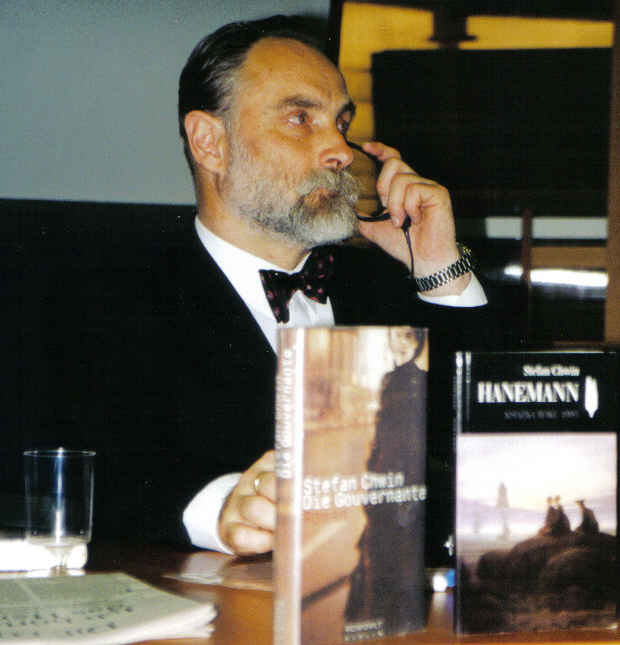 Stefan Chwin auf der Frankfurter Buchmesse 2000